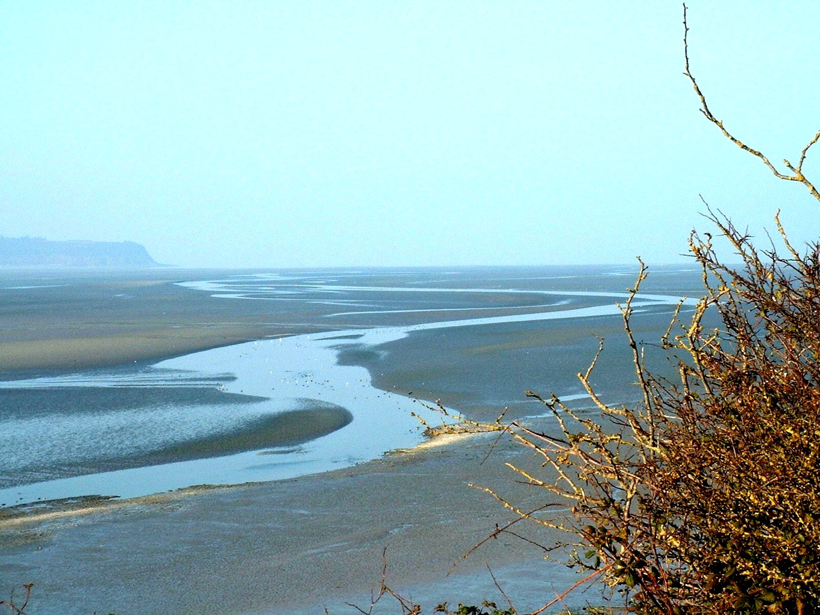 Golfeto de San Briego